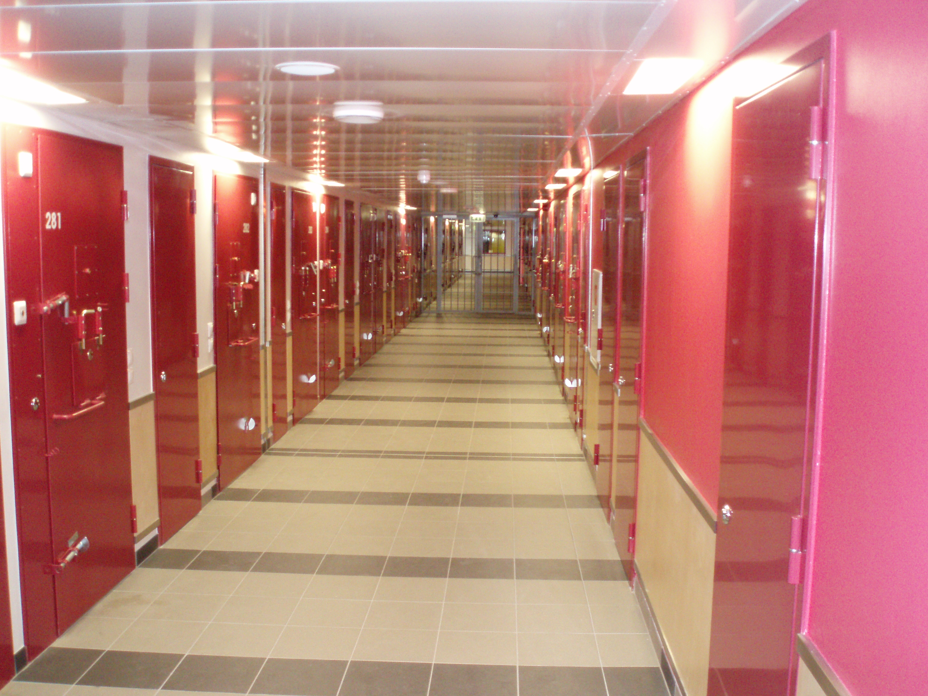 Viru Prison, Estonia